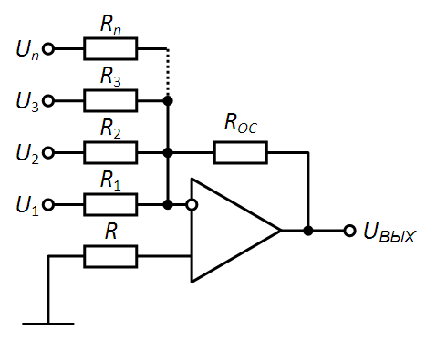 Сумматор на операционном усилителе